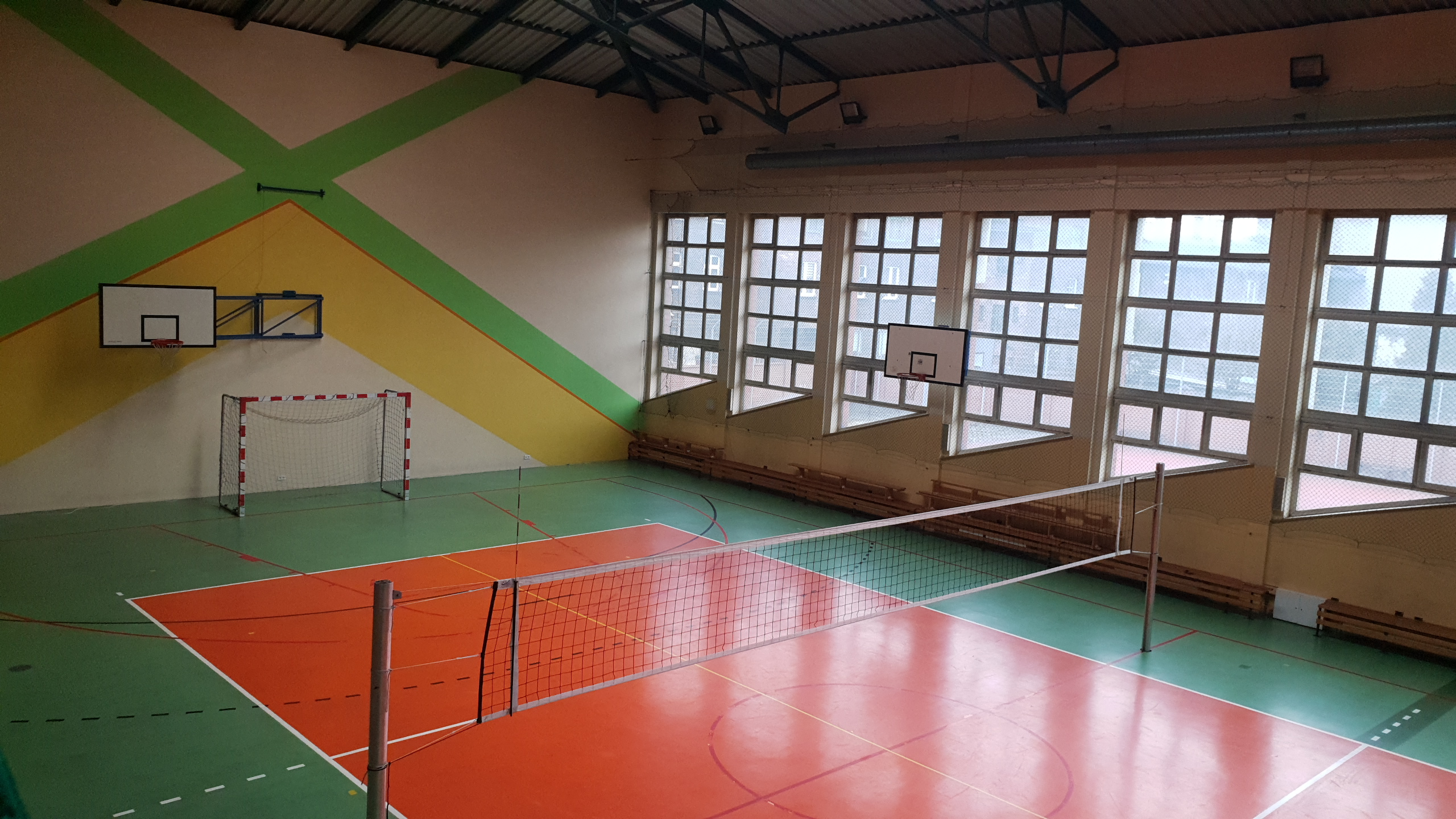 Sala gimnastyczna VILO w Katowicach-Szopienicach.